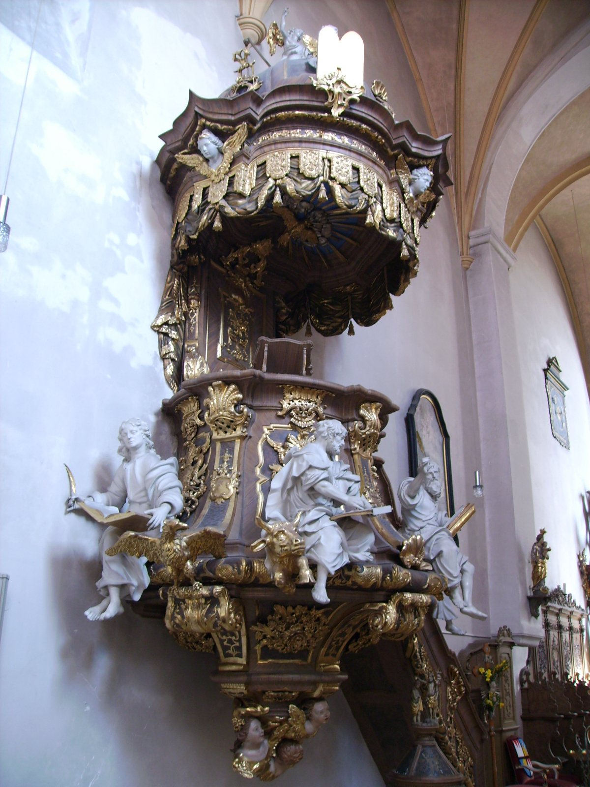 Das Kloster Tückelhausen ist ein ehemaliges Kloster der Kartäuser in Ochsenfurt in Bayern. Kanzel der Klosterkirche.